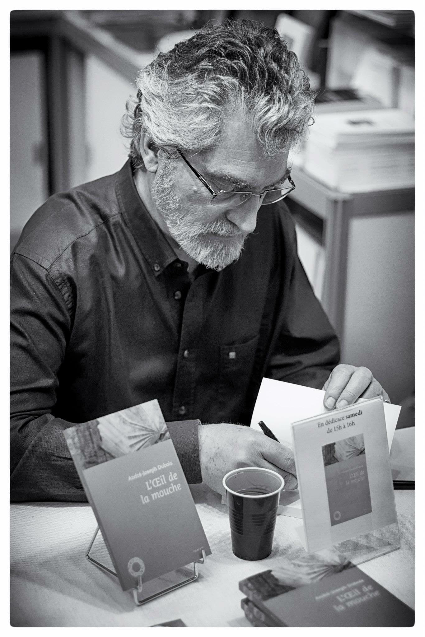 André-Joseph Dubois à la Foire du livre de Bruxelles en 2013